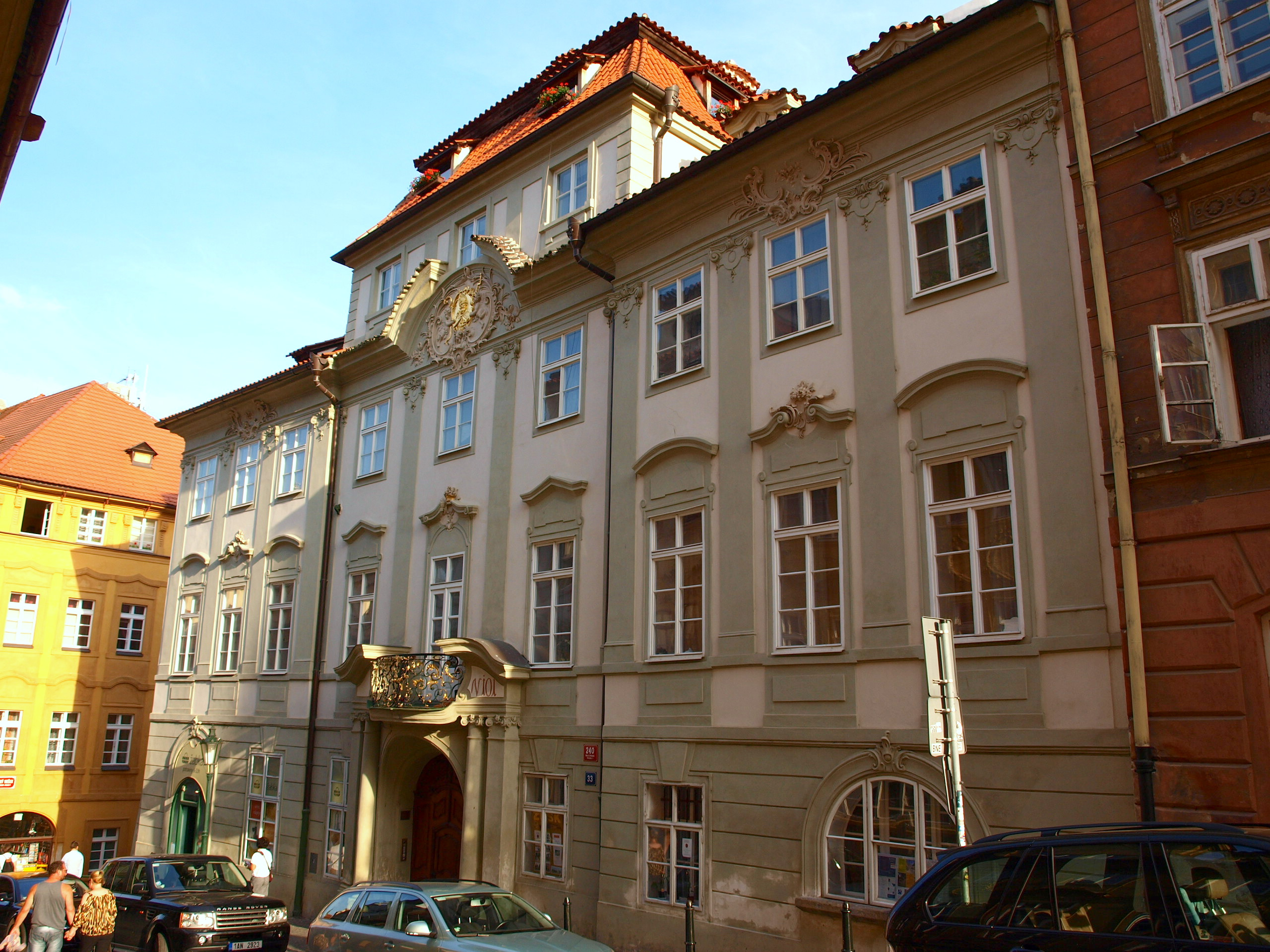 Bretfeldovský palác, Nerudova ulice